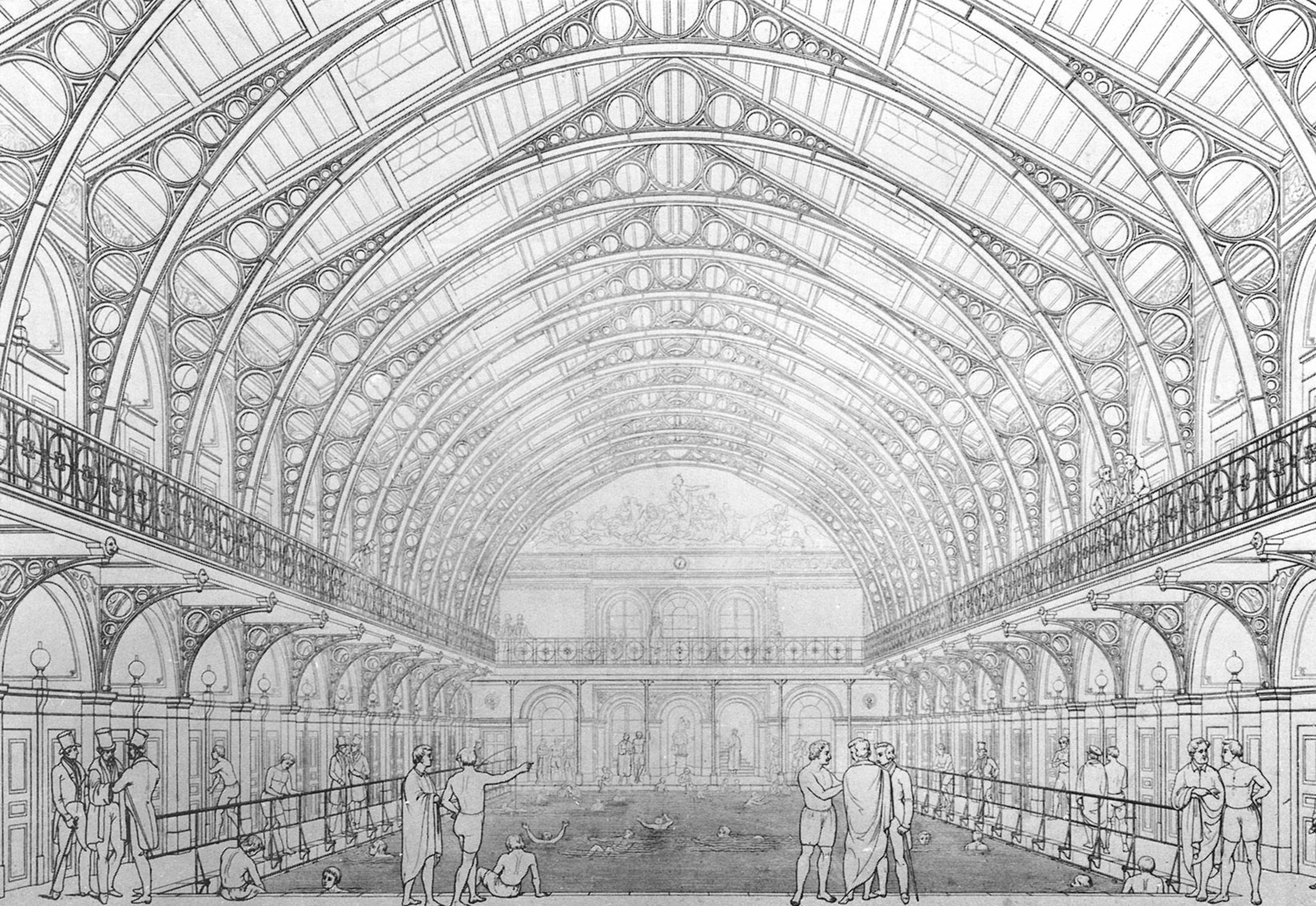 de: Die Stahlkonstruktion der Schwimmhalle im alten Dianabad um 1842